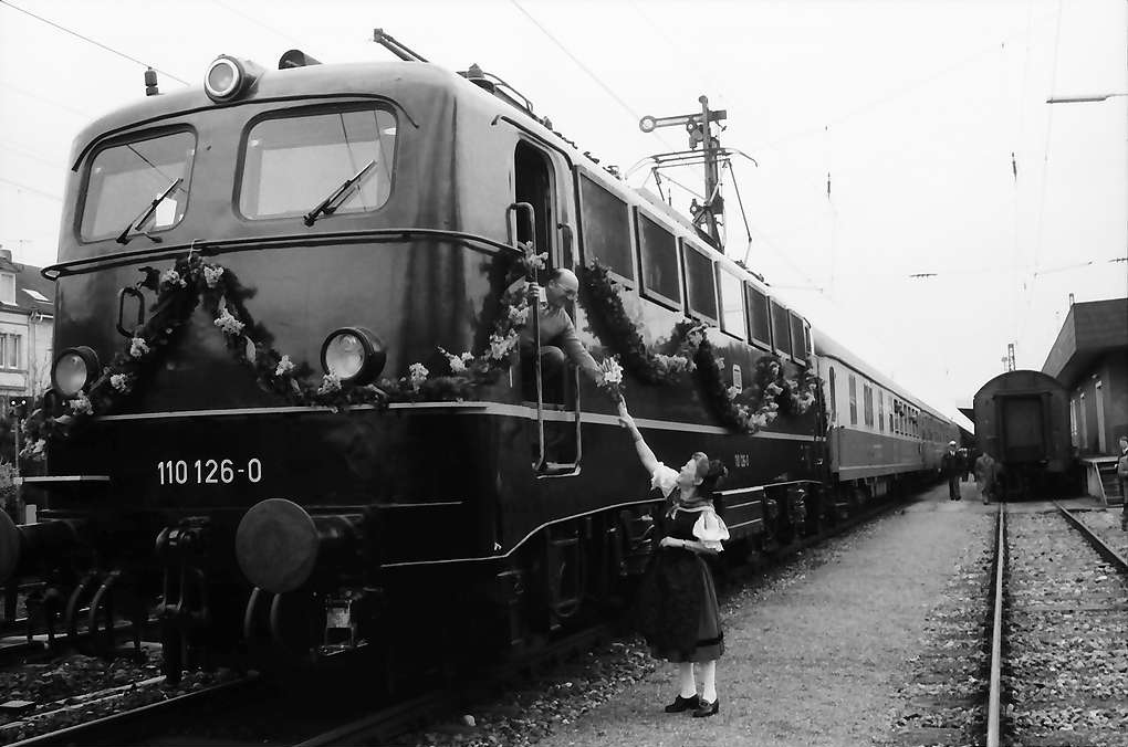 Lörrach: Landesgartenschau, Eröffnung; Frau Jung überreicht dem Lokführer des Sonderzugs Blumen